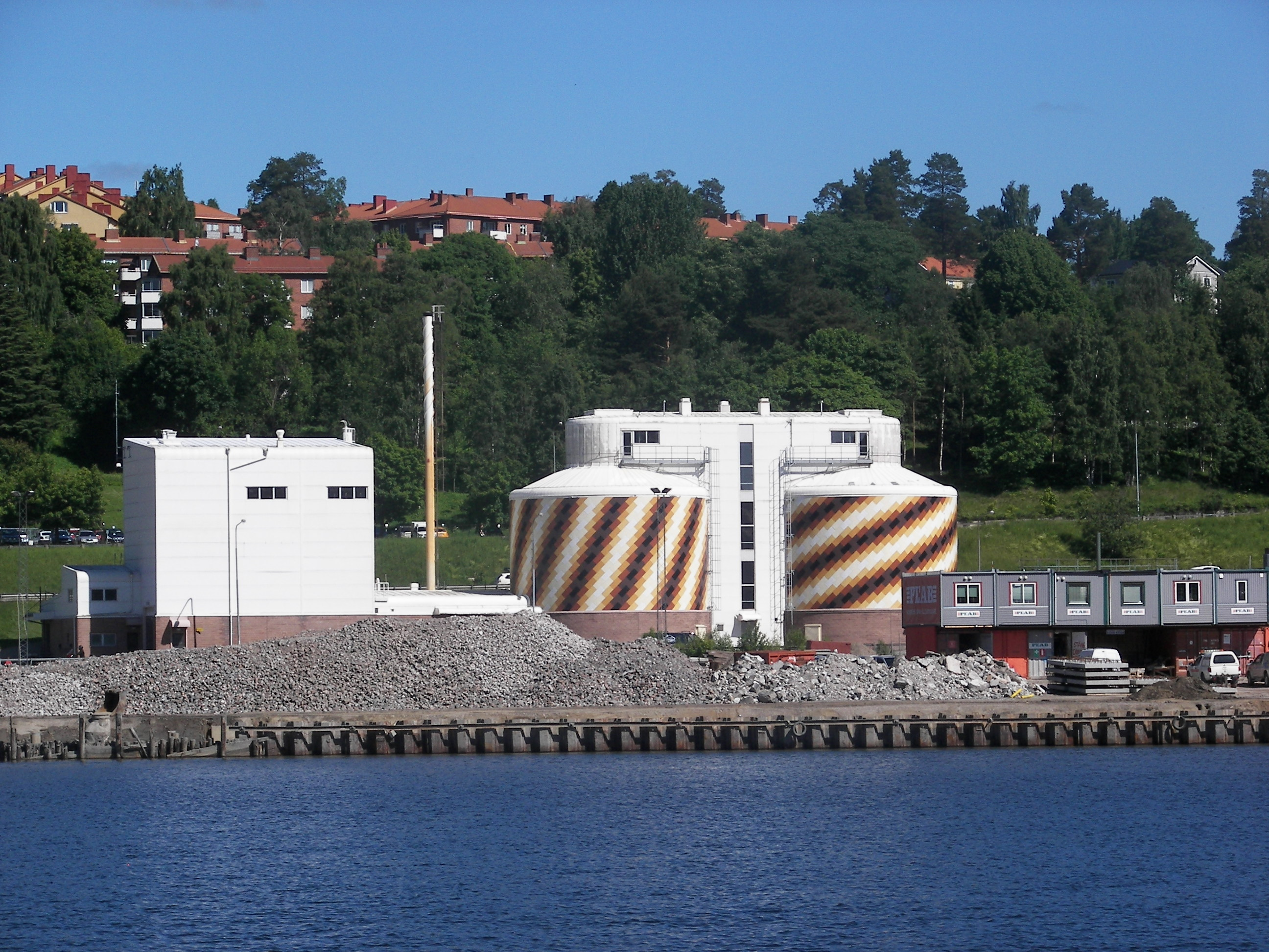 Tivoliverken i Sundsvall (med fasadverk i emaljerad plåt av Lars Englund)